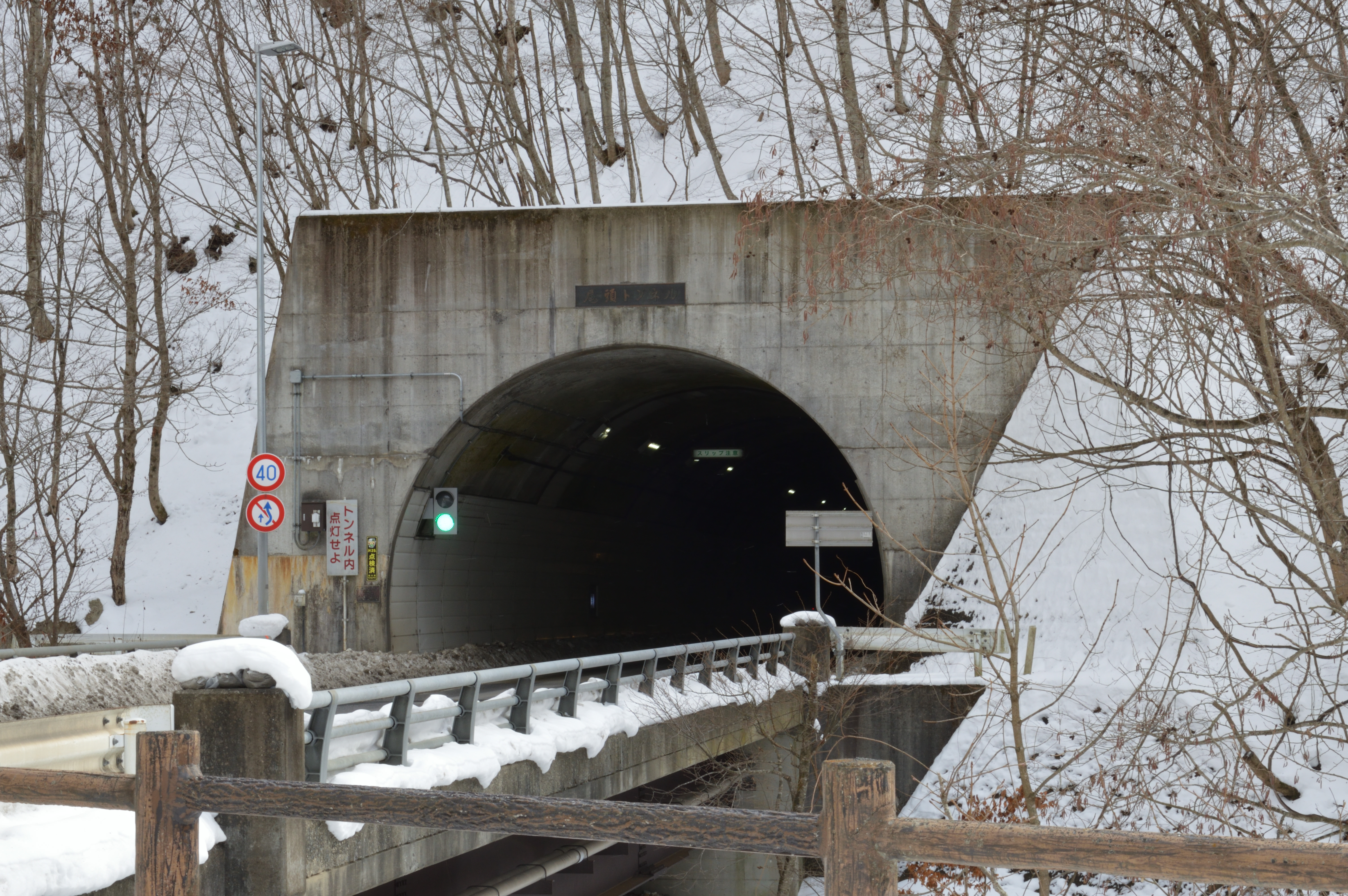 国道400号尾頭トンネル上三依側ポータル Nikon D3200